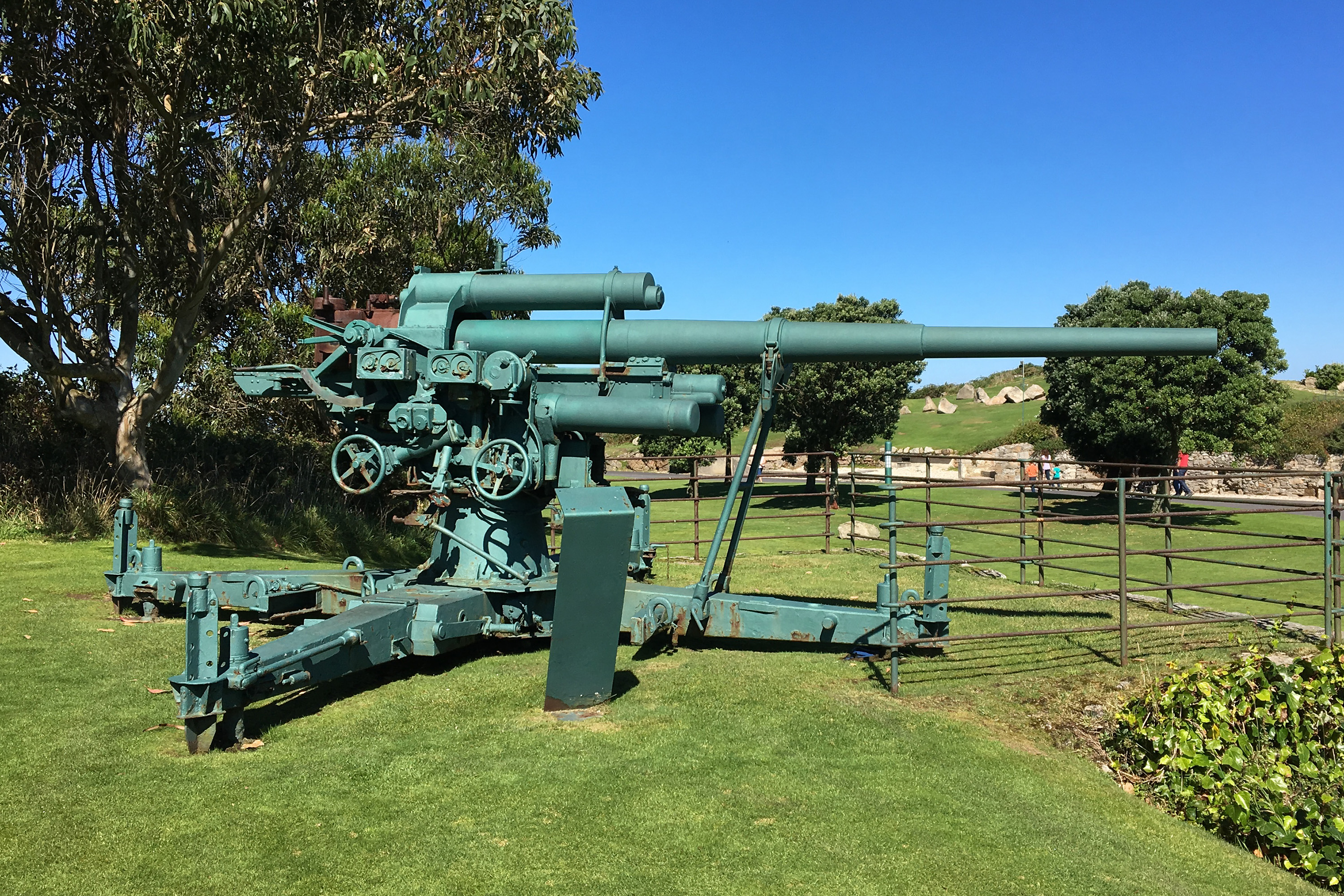 Un cañón antiaéreo FlaK 18, de calibre de 88 mm, en la antigua Batería B-8 de artillería de costa del Monte San Pedro, en La Coruña (Galicia, España). FlaK 18 in the B-8 Battery of Mount San Pedro FlaK 18 anti-aircraft cannon, 88 mm caliber, in the old Battery B-8 of coastal artillery of Mount San Pedro, in La Coruña (Galicia, Spain).